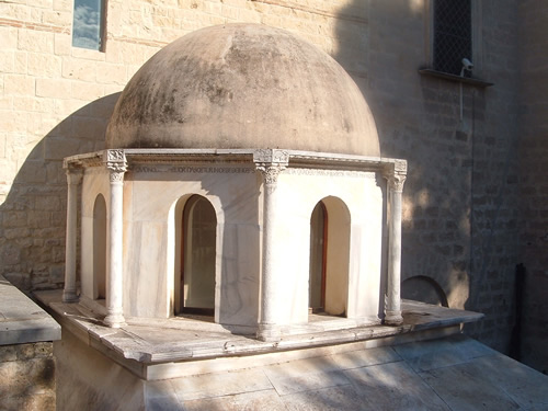 Cupola del Mausoleo di Boemondo